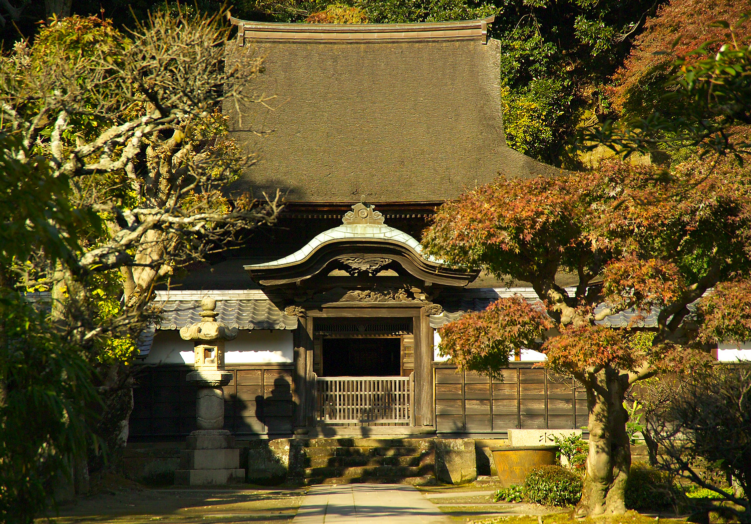 Shariden at Engaku-ji in Kamakura, Japan 鎌倉円覚寺の舎利殿